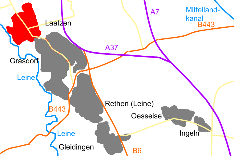 Karte Alt- Laatzen in Laatzen. Erstellt unter Verwendung von Laatzen in Laatzen.png von hover dam